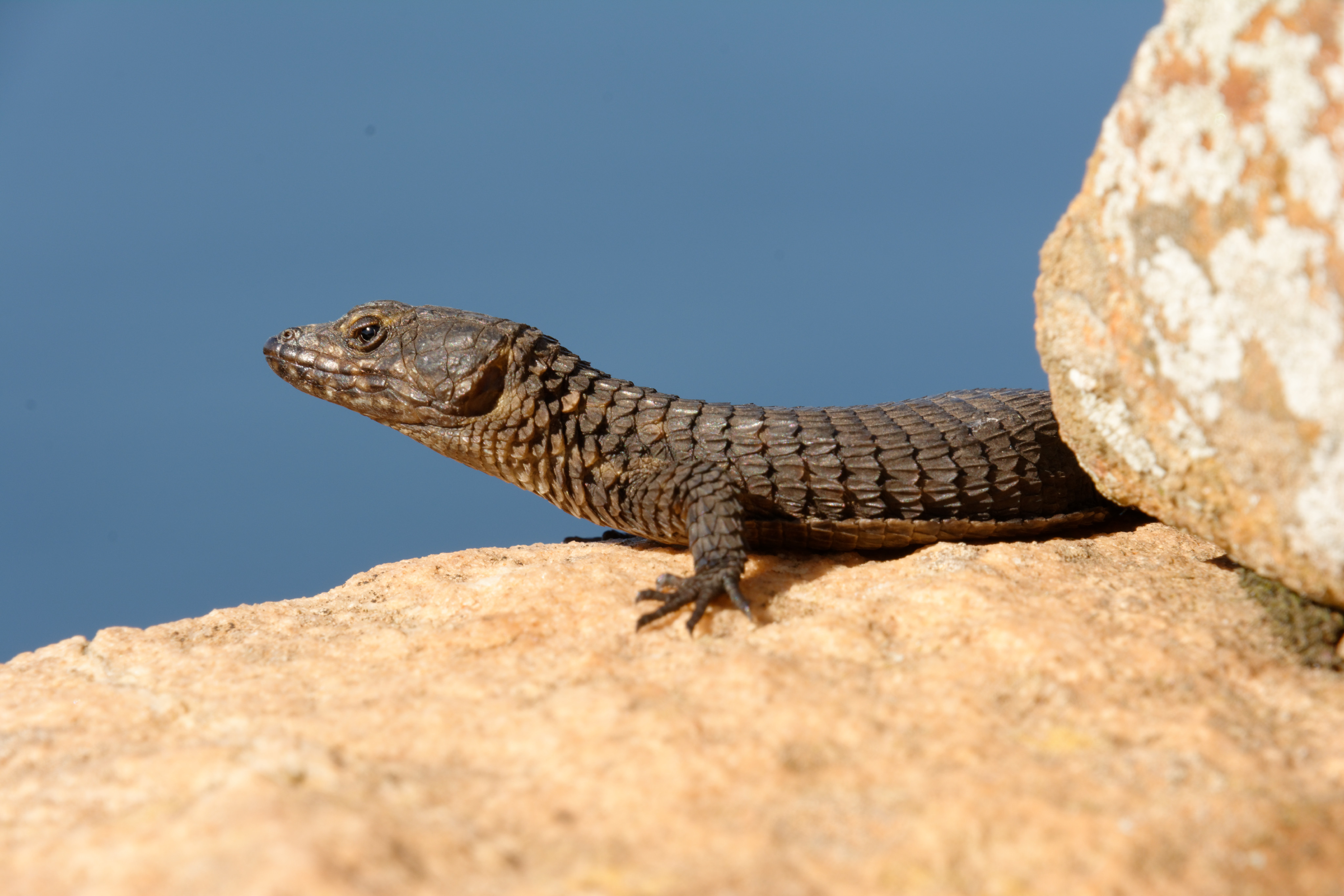 Cape Point